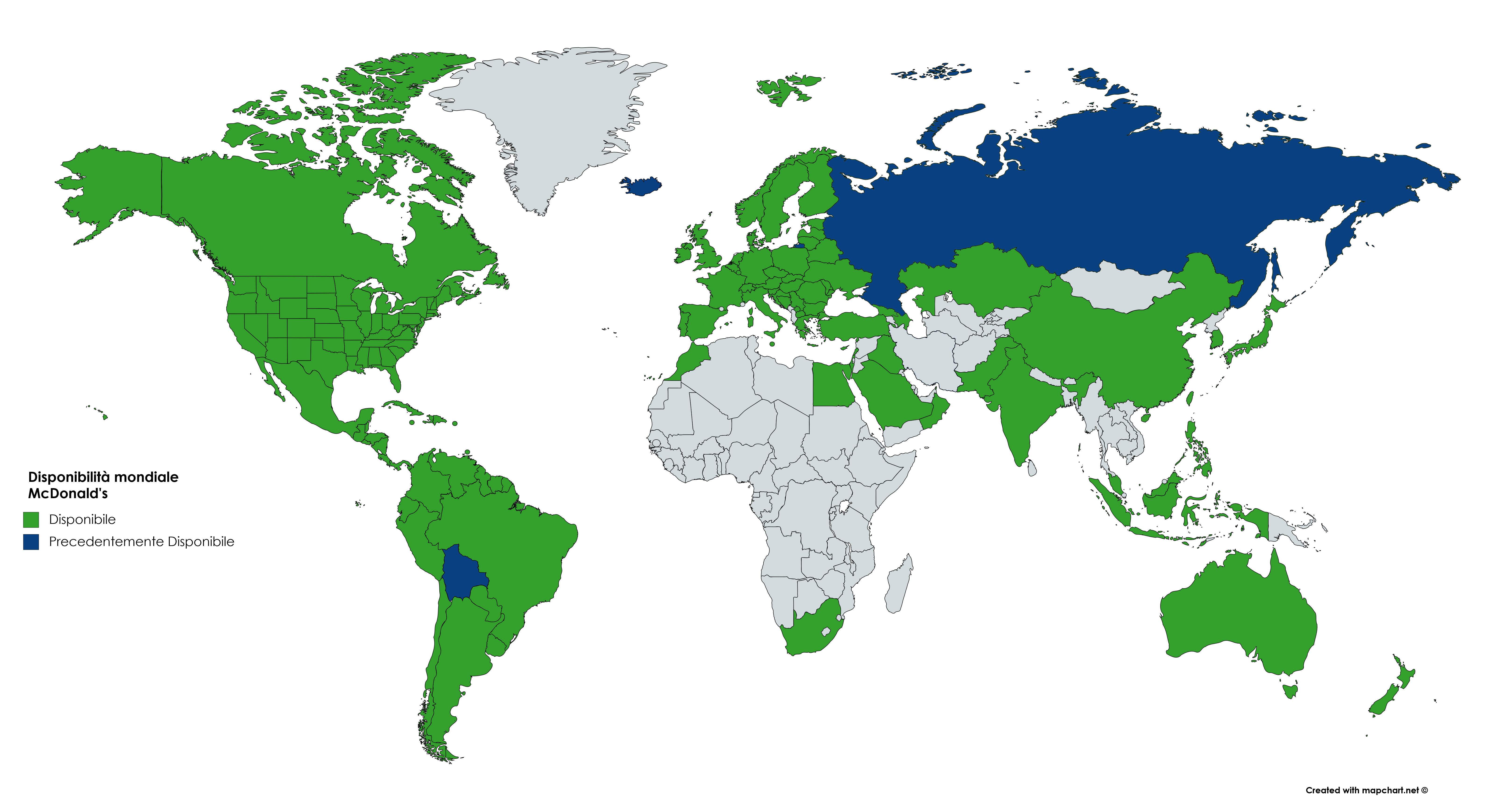 Semplice mappa che rappresenta la disponibilità mondiale di McDonald's